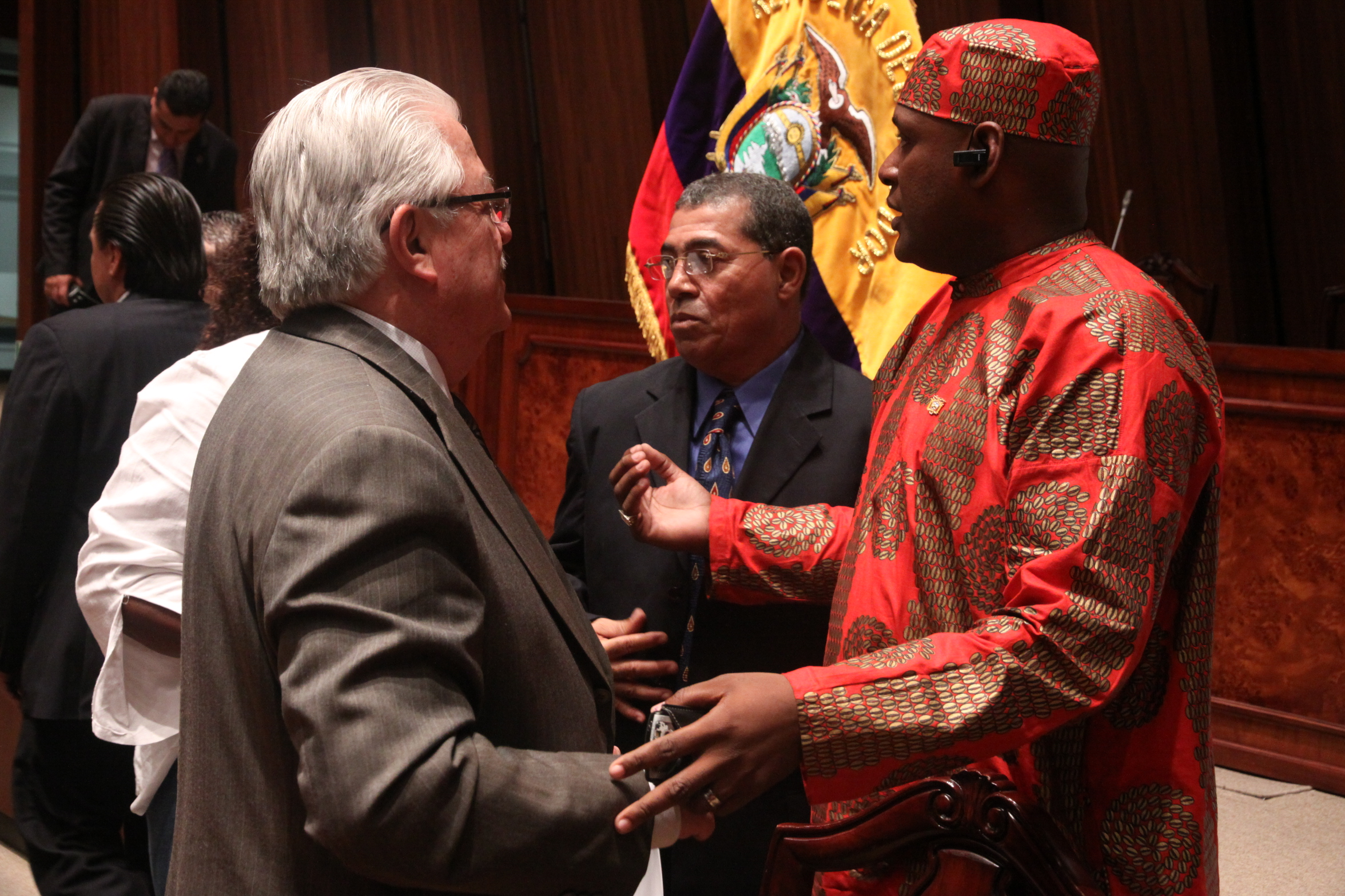 27 de Abril de 2010